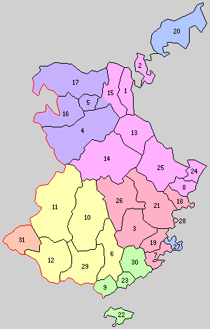 和歌山県東牟婁郡の町村制時点の町村。